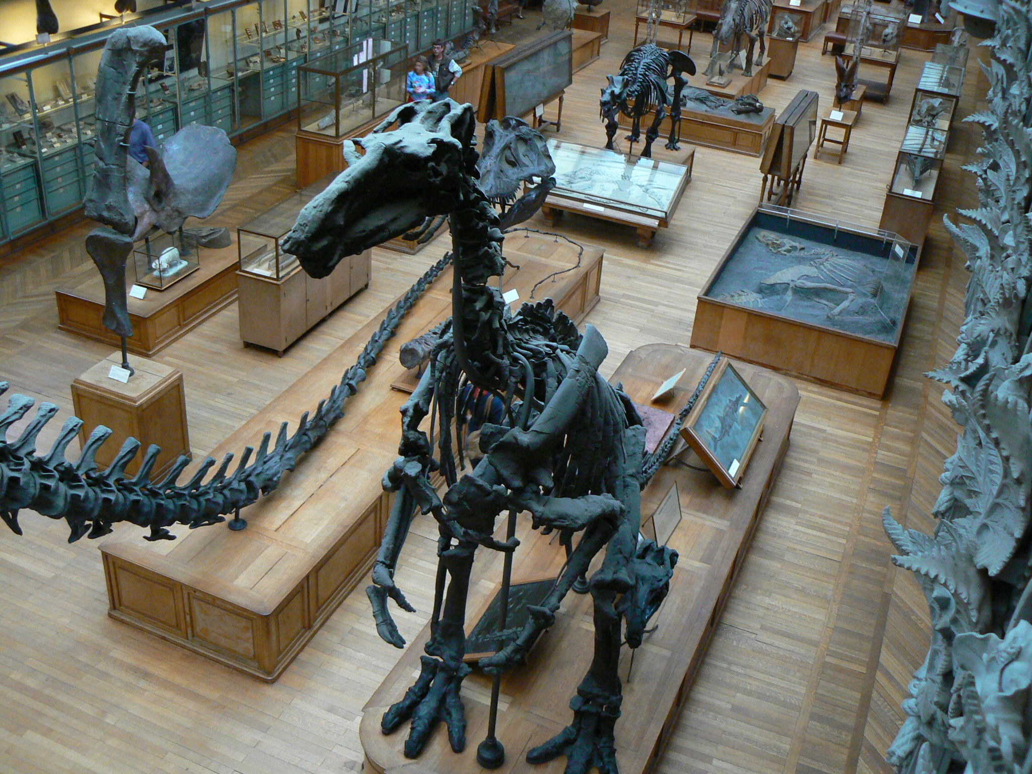 Iguanodon bernissartensis